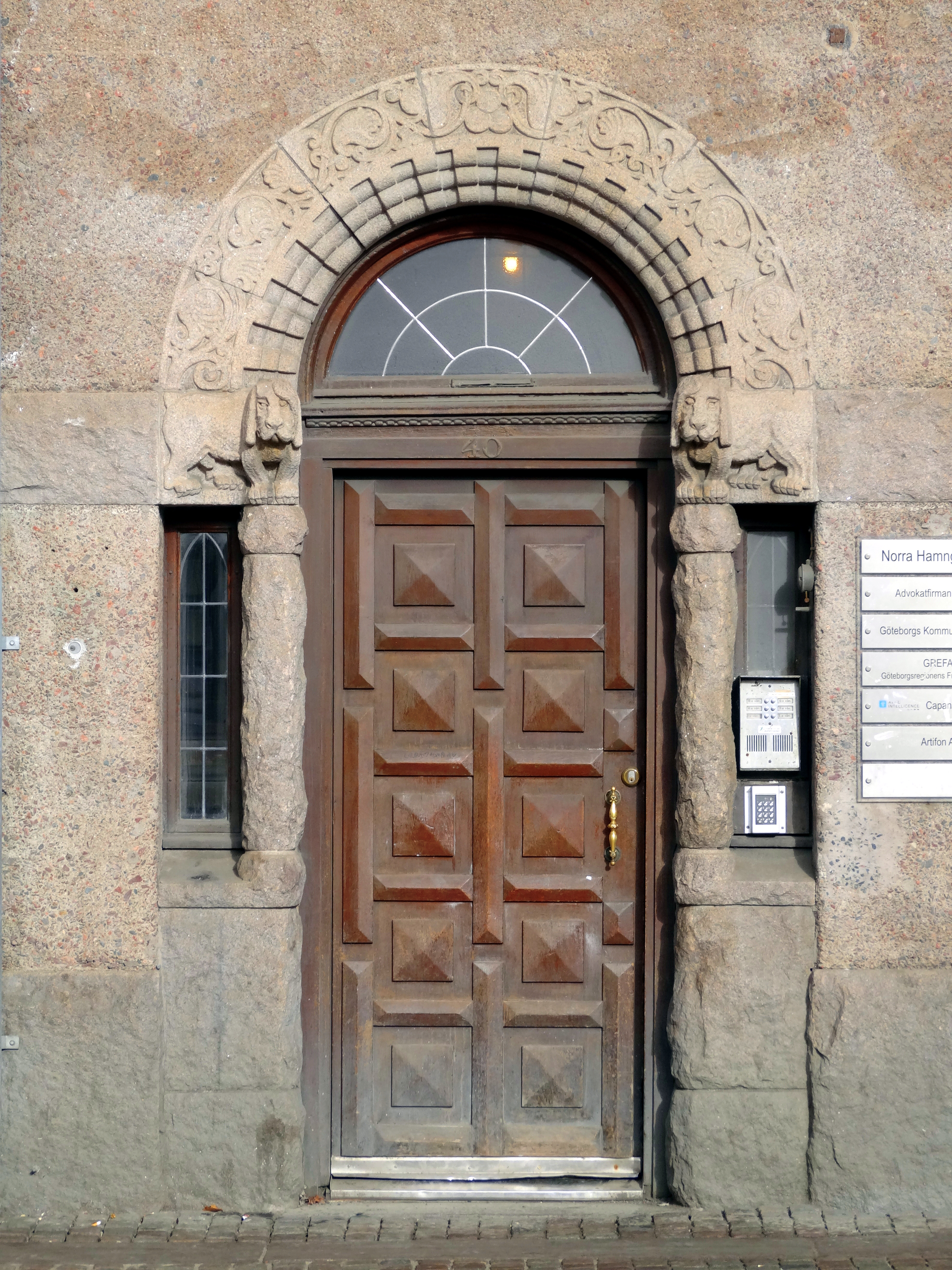 Norra Hamngatan 40/Nils Ericsonsgatan 25 i Kvarteret 10 Kronobageriet, tomt 10:18, Göteborg.